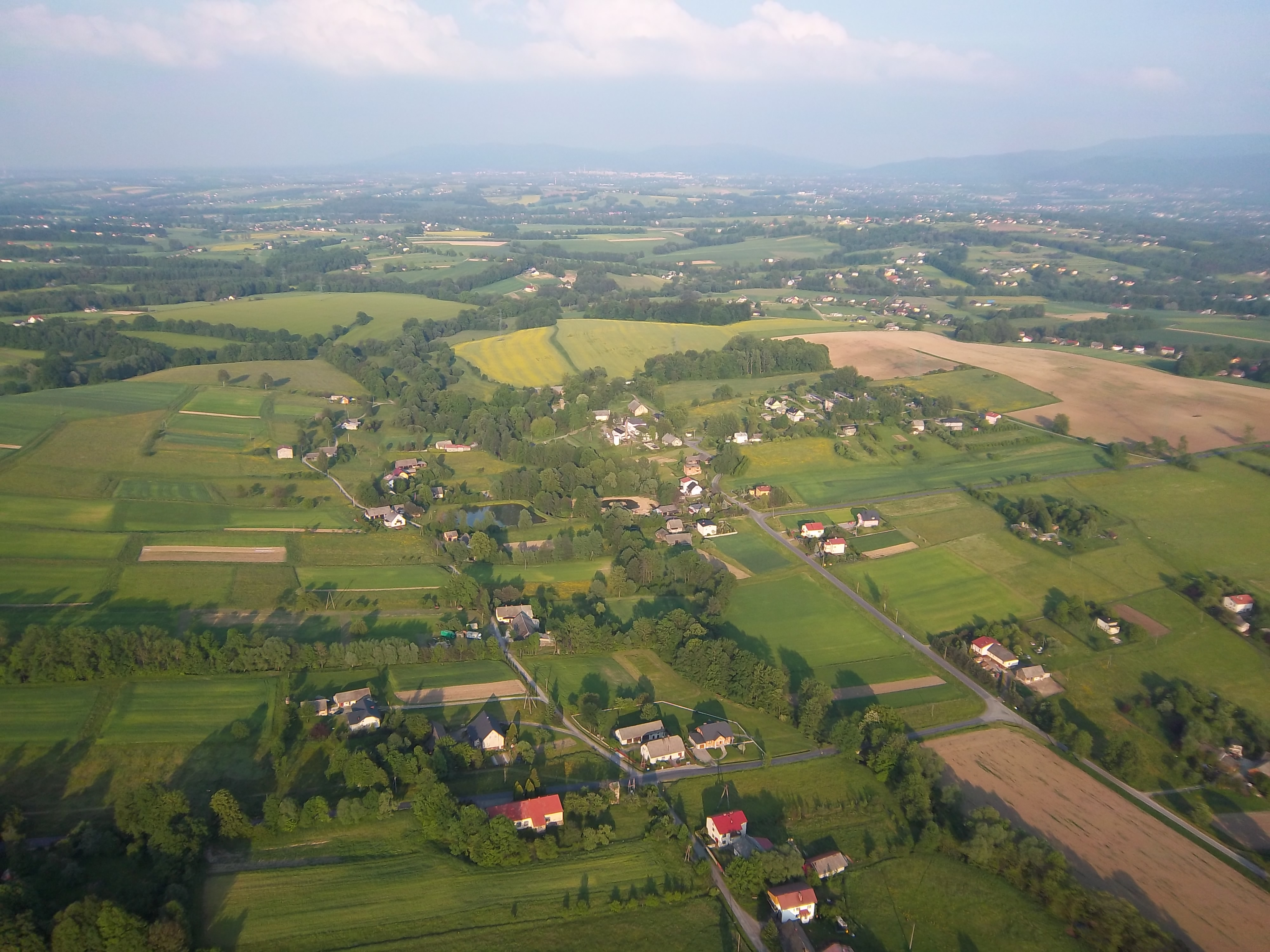 Fragment Roztropic widziany z powietrza.